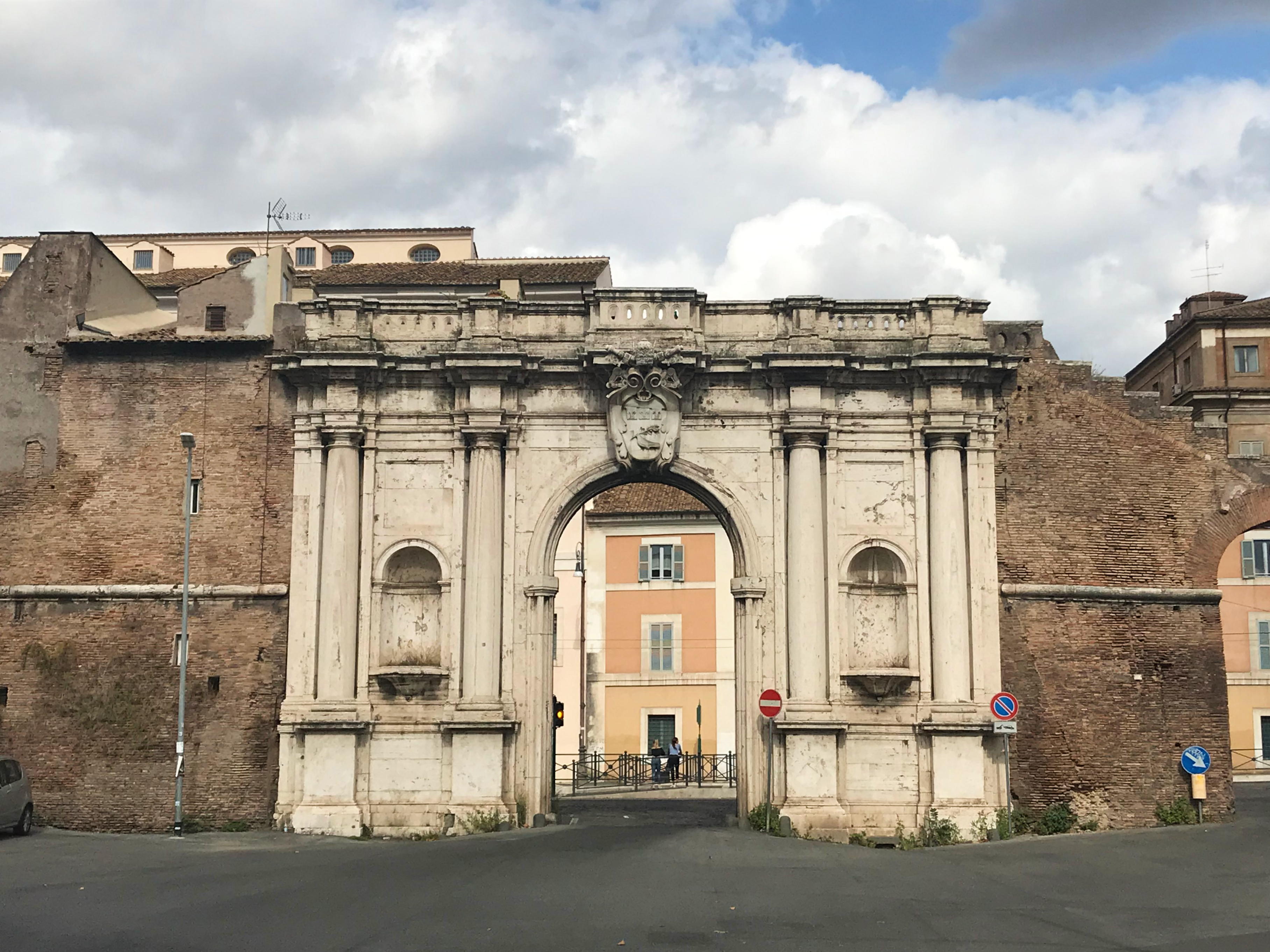 Porta Portese a Roma, Italia